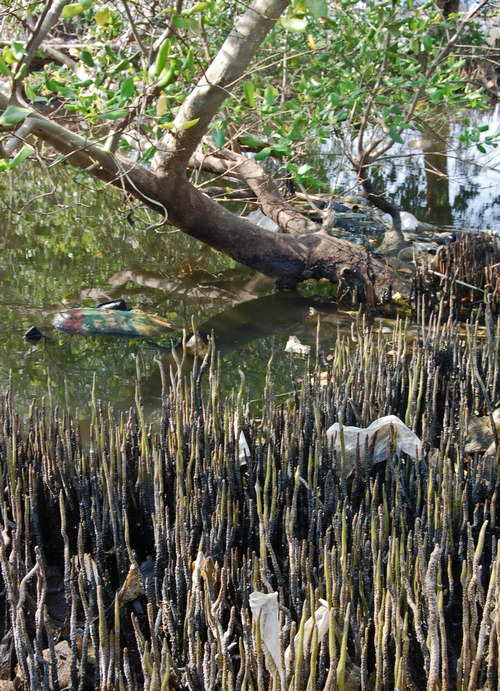 Avicennia marina root, Muara Angke, Jakarta, Indonesia